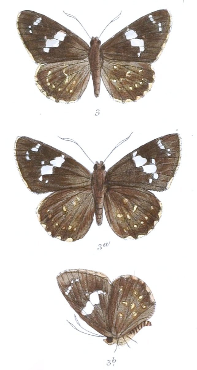 Celaenorrhinus leucocera (male, female and female underside)